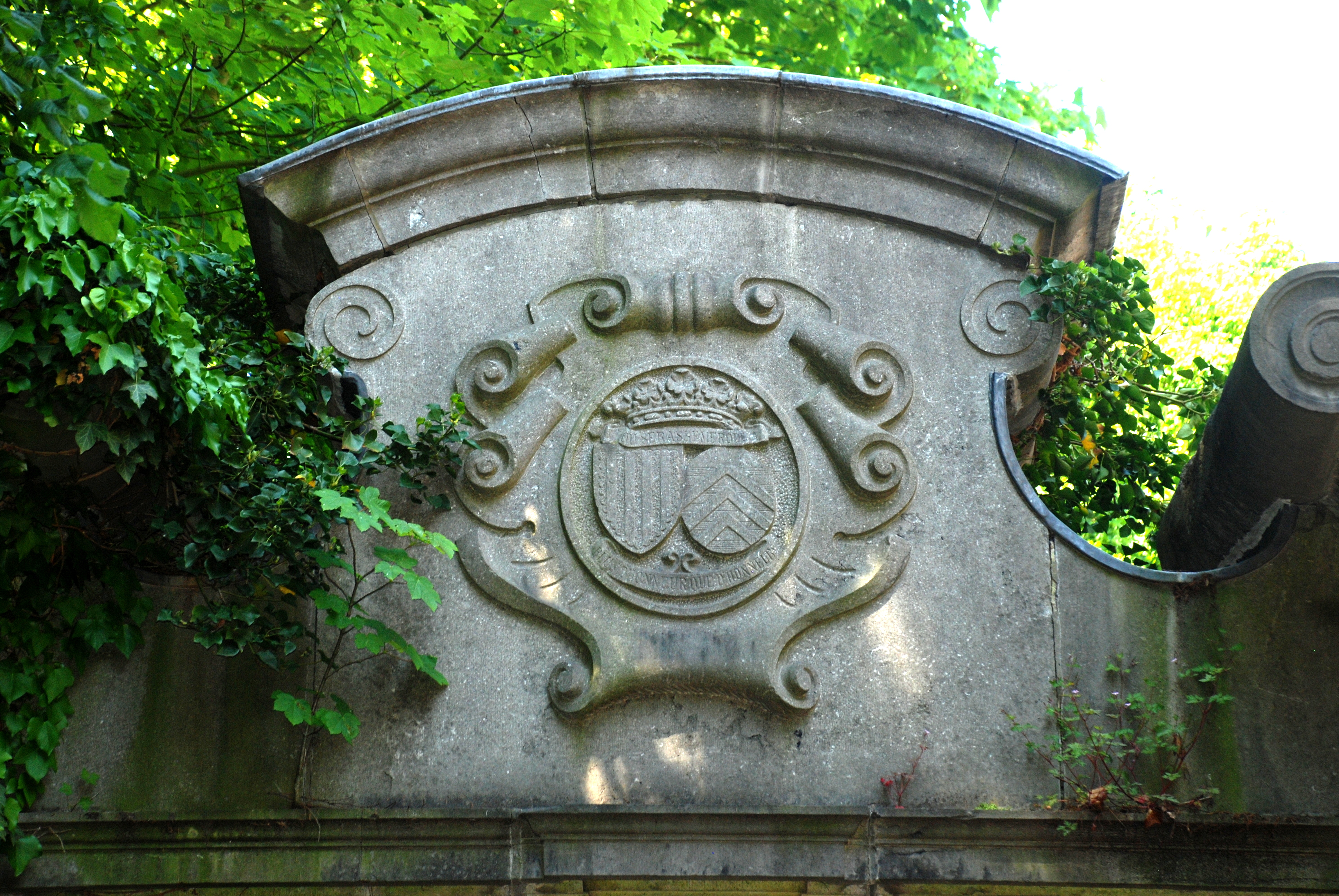 Belgique - Brabant wallon - Château de Rixensart